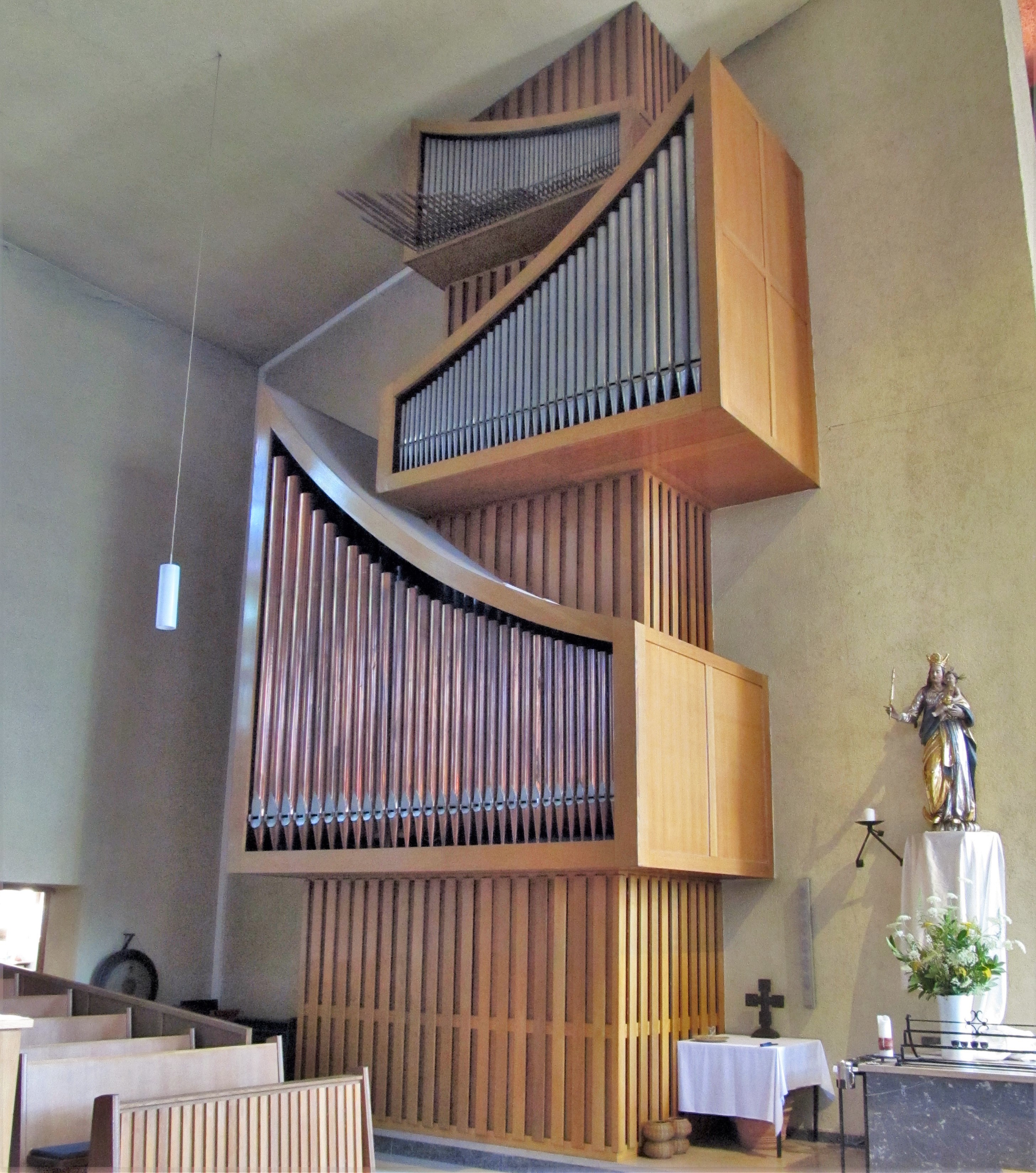 Orgelwerke in der kath. Pfarrkirche Maria vom Frieden in Homburg-Erbach, Saarland